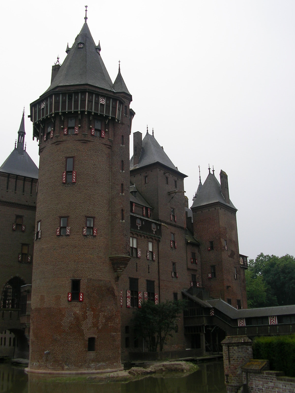 Kasteel De Haar 22 juli 2006 Gemaakt door wikipedia vrijwilliger gijsevers